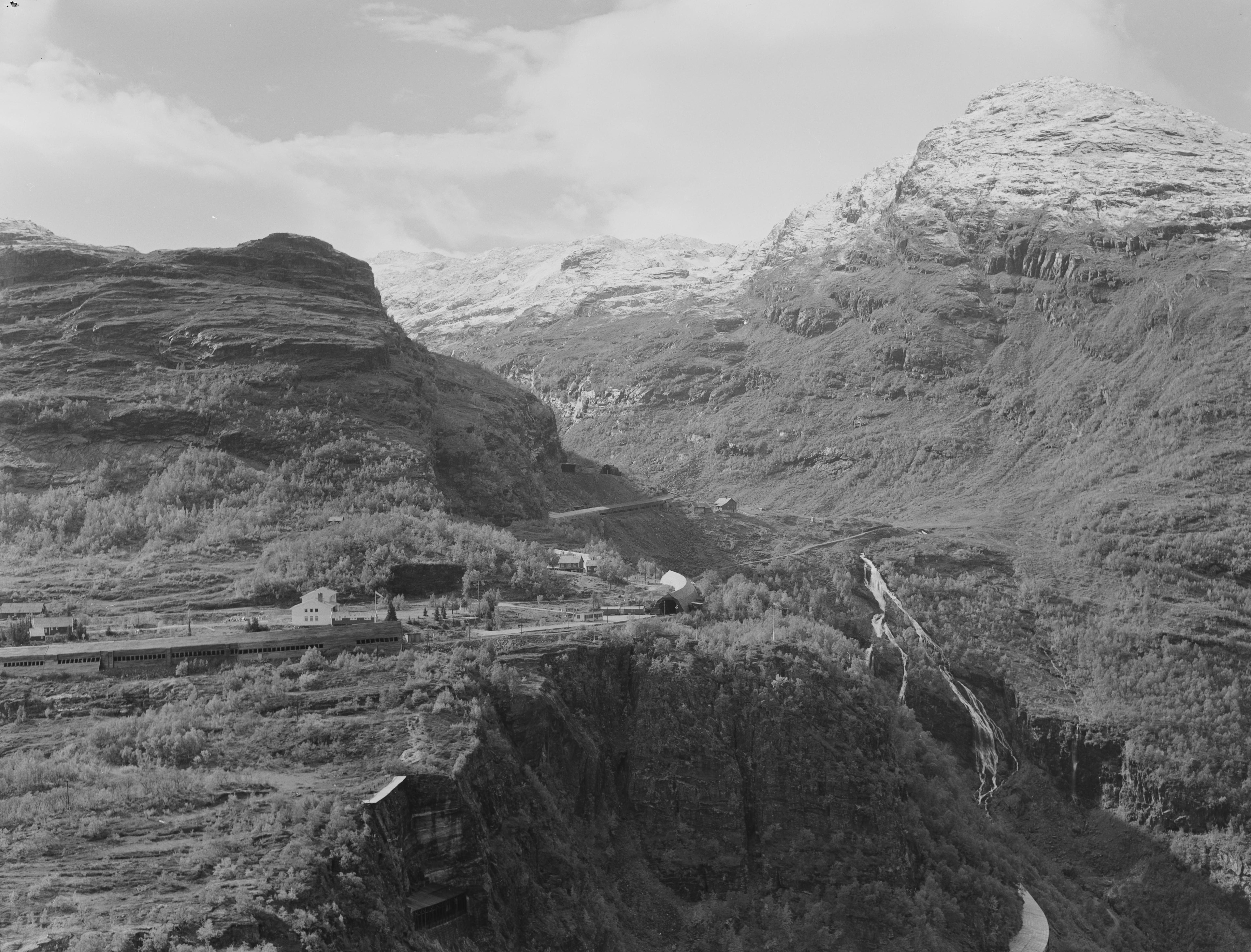 Bildet er hentet fra Nasjonalbibliotekets bildesamling. Anmerkninger til bildet var: Fotograf : ukjent Vatnahalsen, Aurland, Sogn og Fjordane